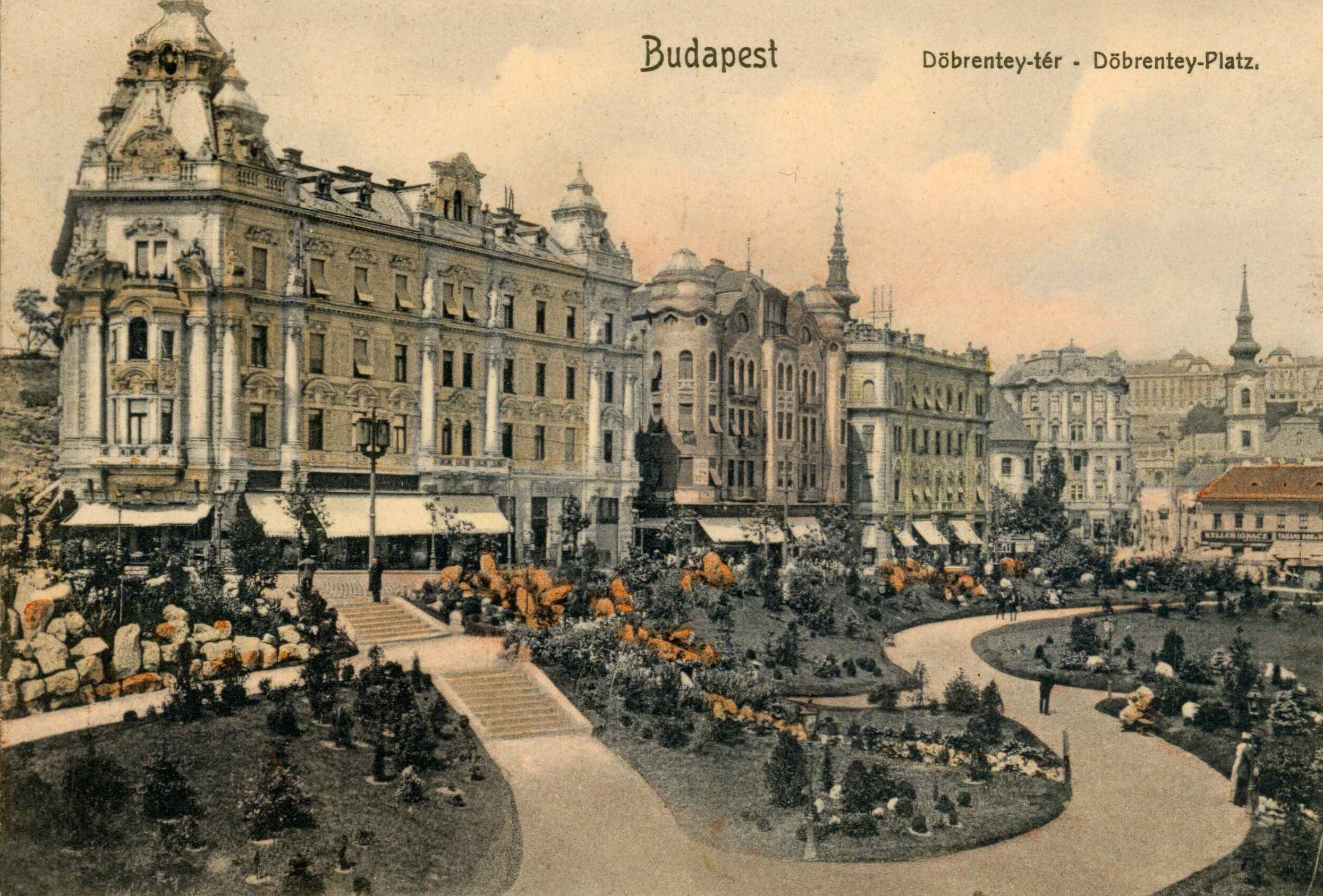 Budapest, Döbrentey tér (1915)